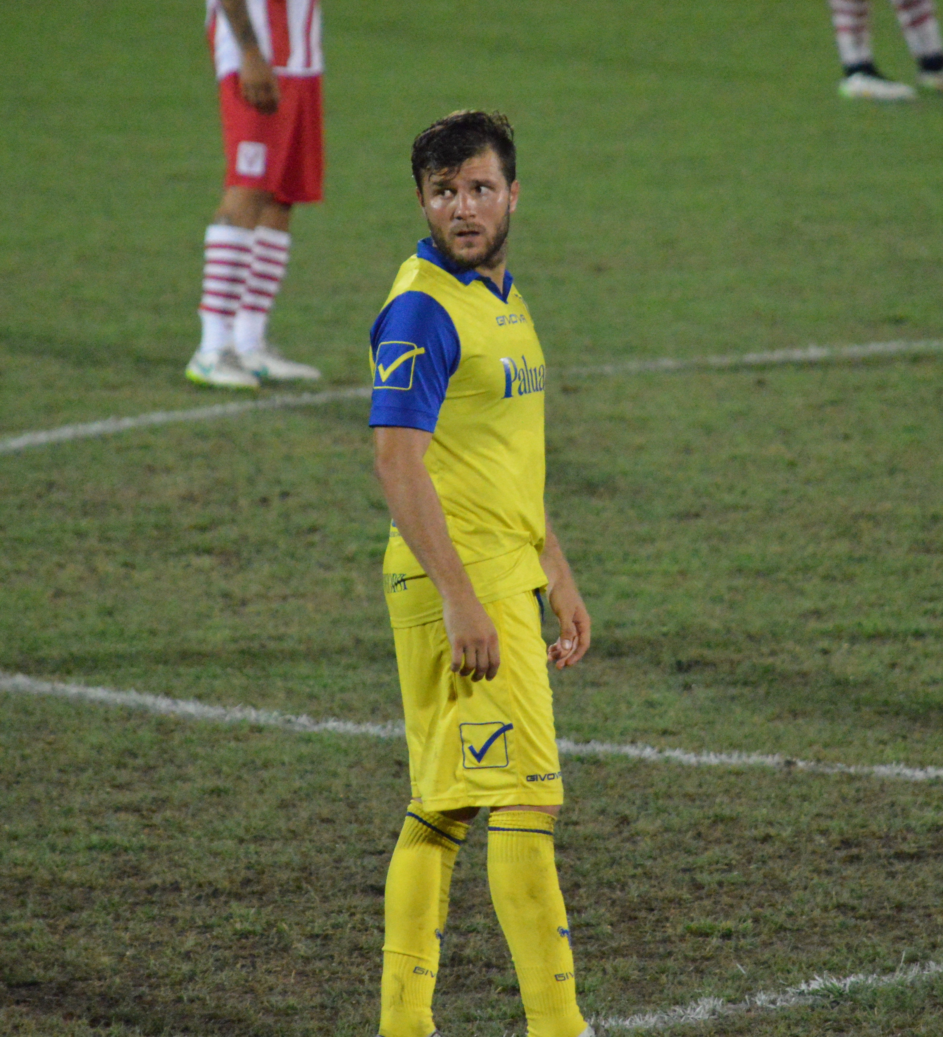 Hetemaj nell'amichevole Vicenza-Chievo